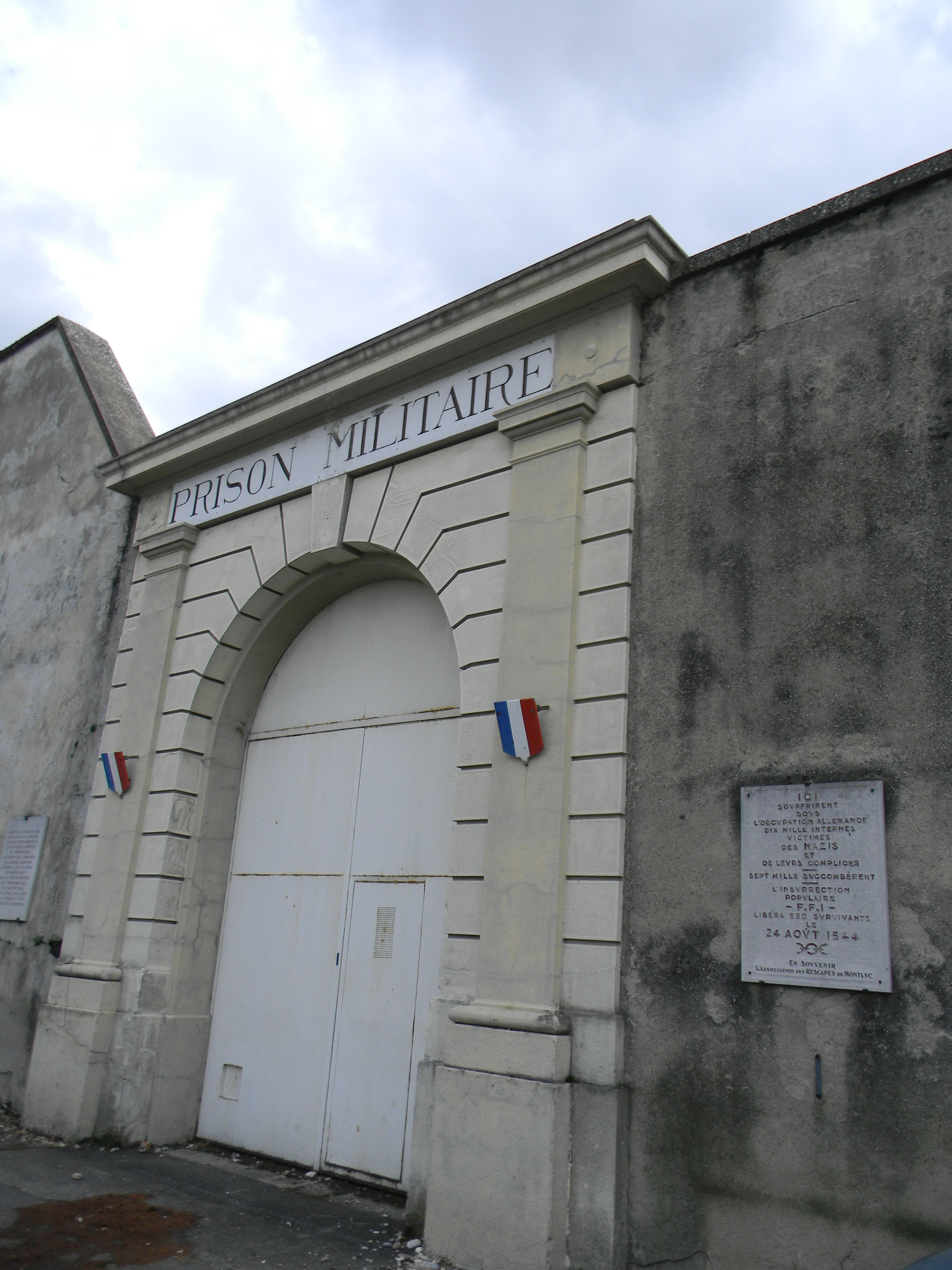 Prison Militaire de Montluc à Lyon